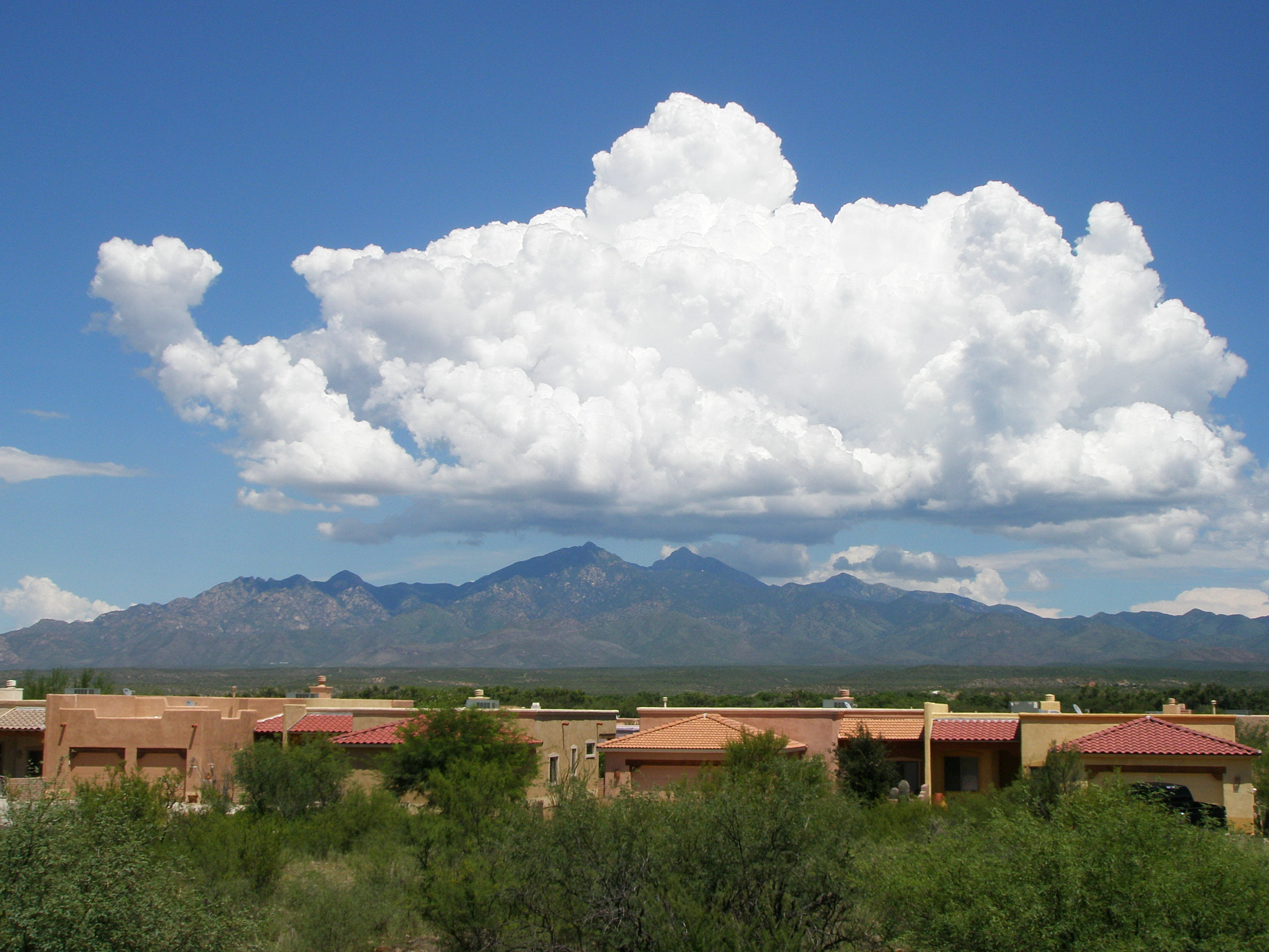 Tubac, Arizona, USA